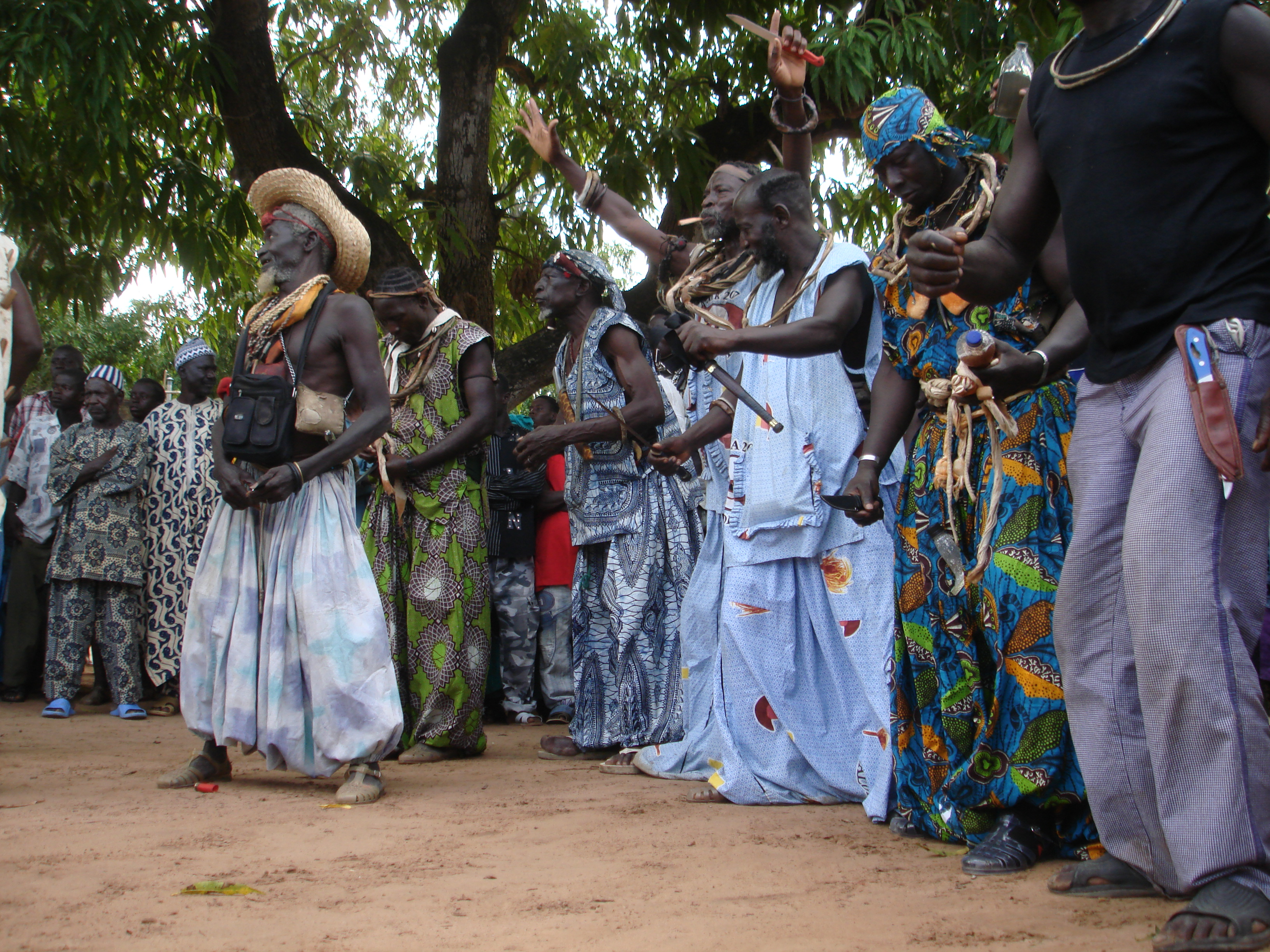 Démonstration de bravoure des Anciens lors du boukout de Baïla (Casamance, Sénégal)